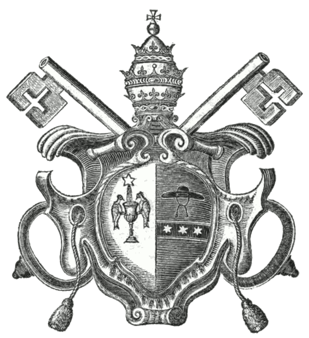 Wappen Gregors XVI. Gregorius XVI (Birth name: Barolomeo Alberto Cappellari, monk: Mauro Cappellari; 1765–1846), Italian monk, from 1831 pope